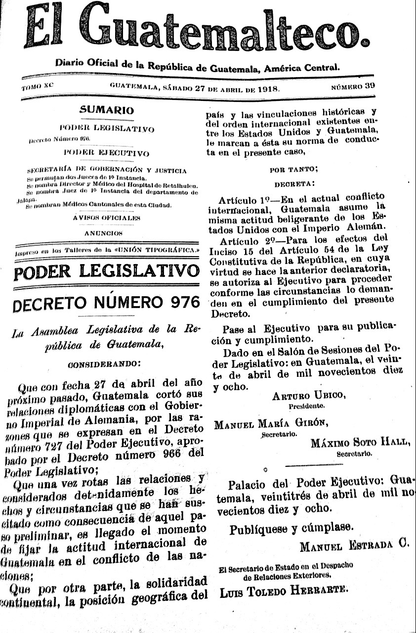 El Guatemalteco, periódico oficial de Guatemala. Abril de 1918.